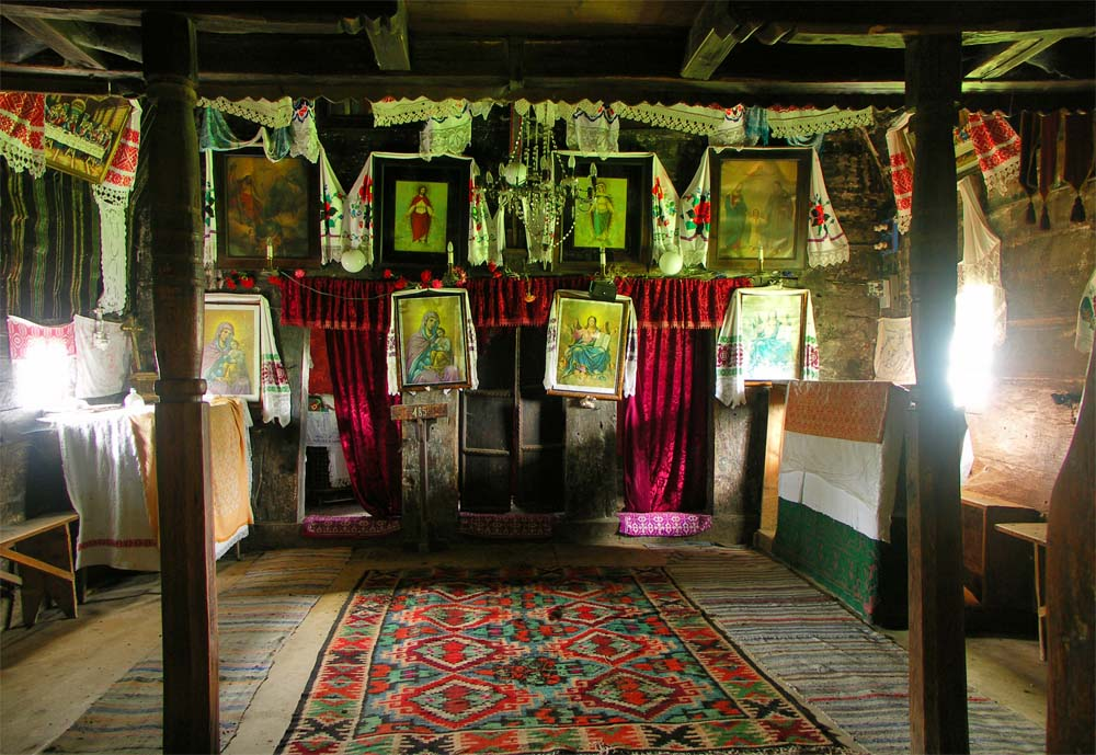 Biserica de lemn din Bălan Josani, nava, spre iconostas.